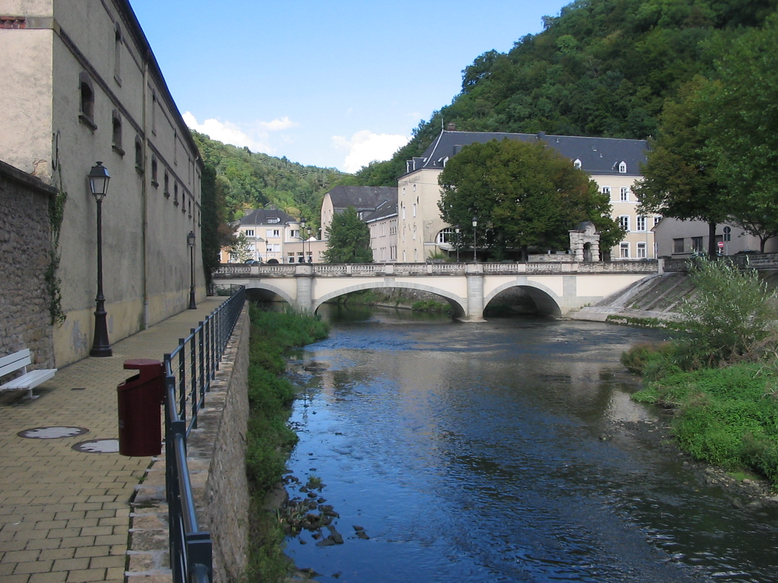 Die Alzette in Luxemburg (Stadt) im Stadtteil Clausen